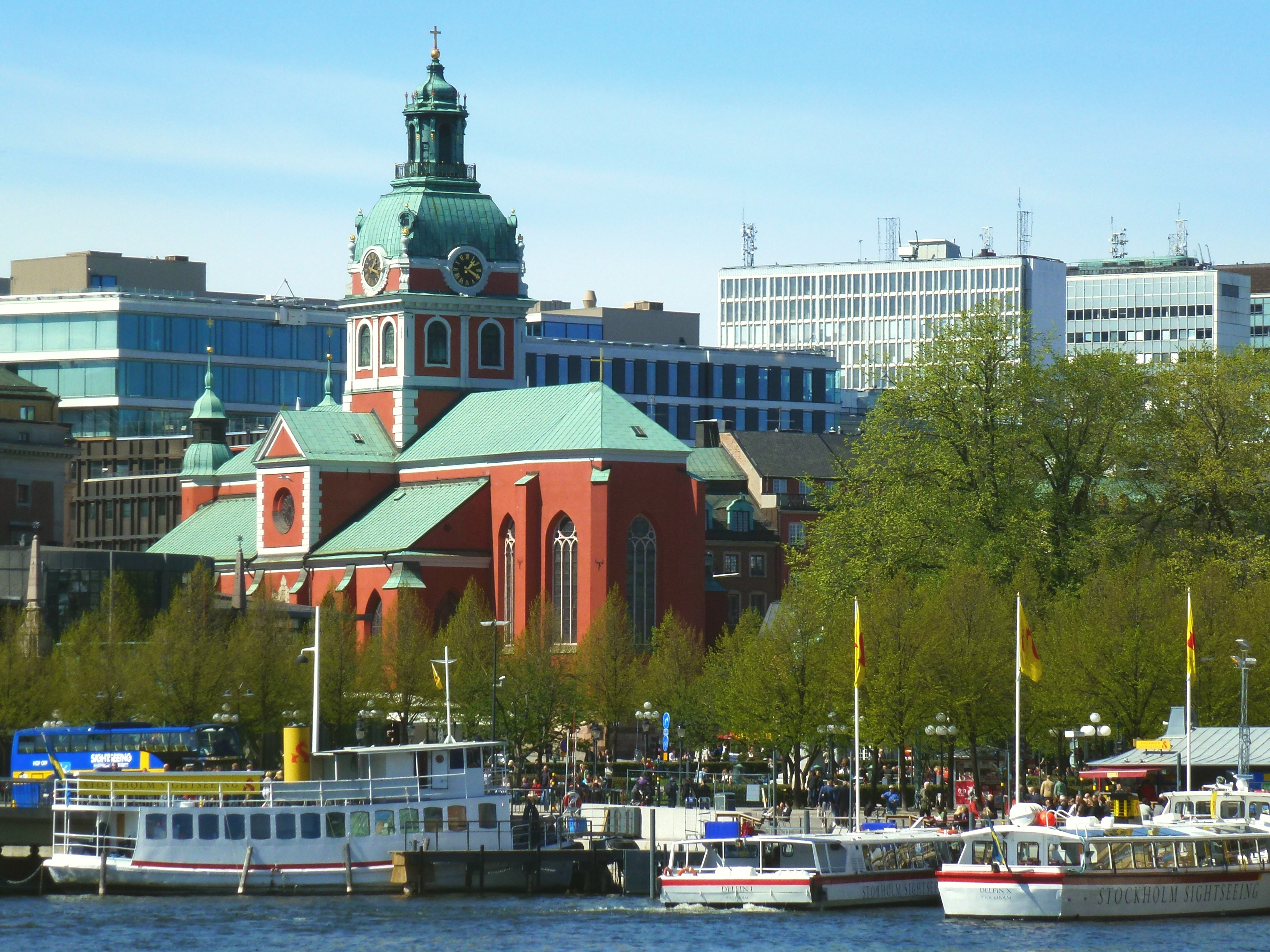 Sankt Jakobs kyrka i Stockholm